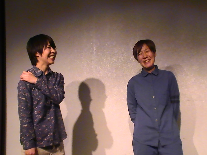 Aマッソ (2016年3月)